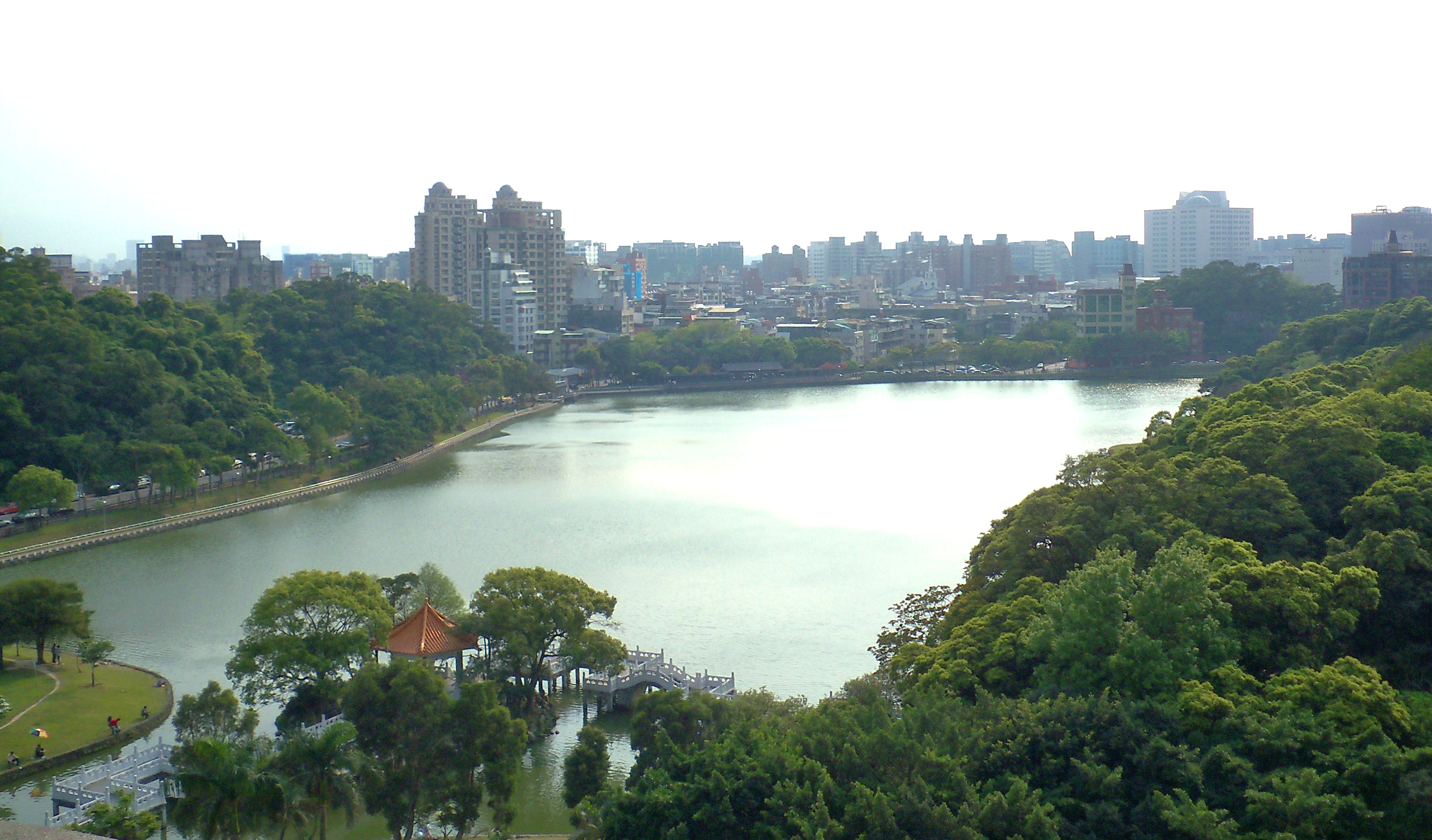 自國立臺灣戲曲學院嘯雲樓俯望碧湖全景。